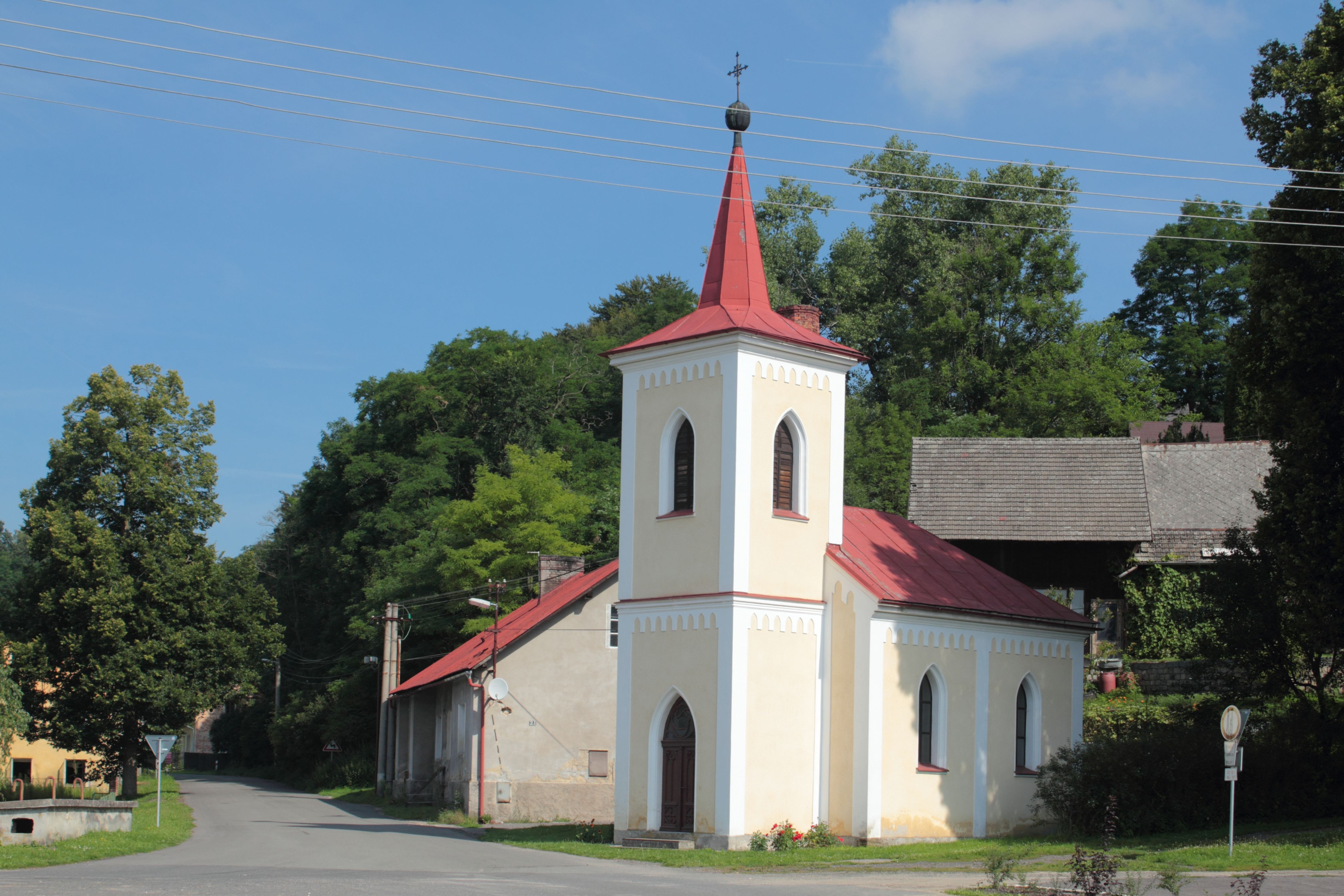 Česky: Kaple Sedmi bratří Machabejských v Korytech, okres Mladá Boleslav